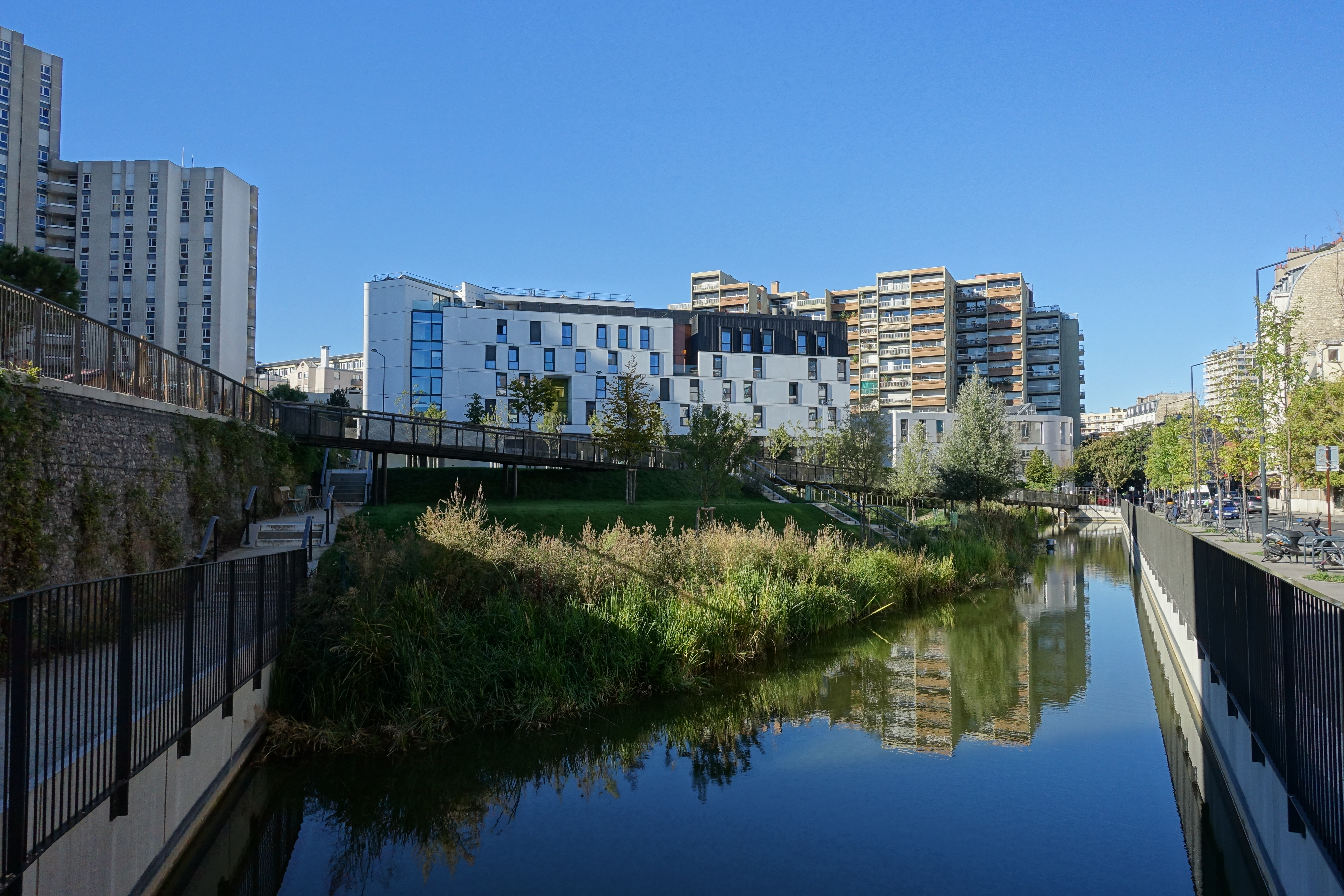 Jardin Charles Trenet @ Ecoquartier Gare de Rungis @ Paris